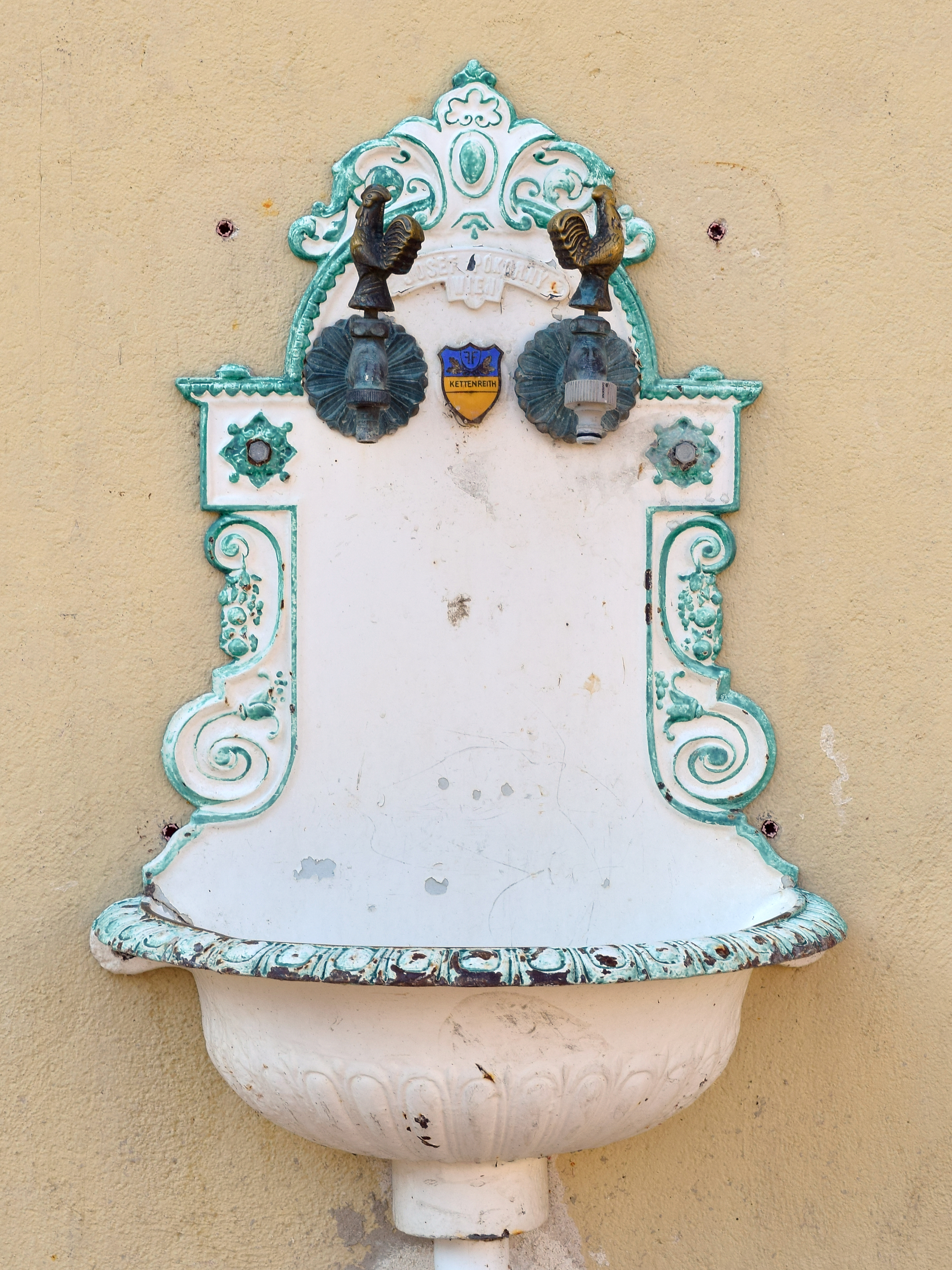 Bassena an der Südseite des Feuerwehrhauses in Kettenreith, Gemeinde Kilb